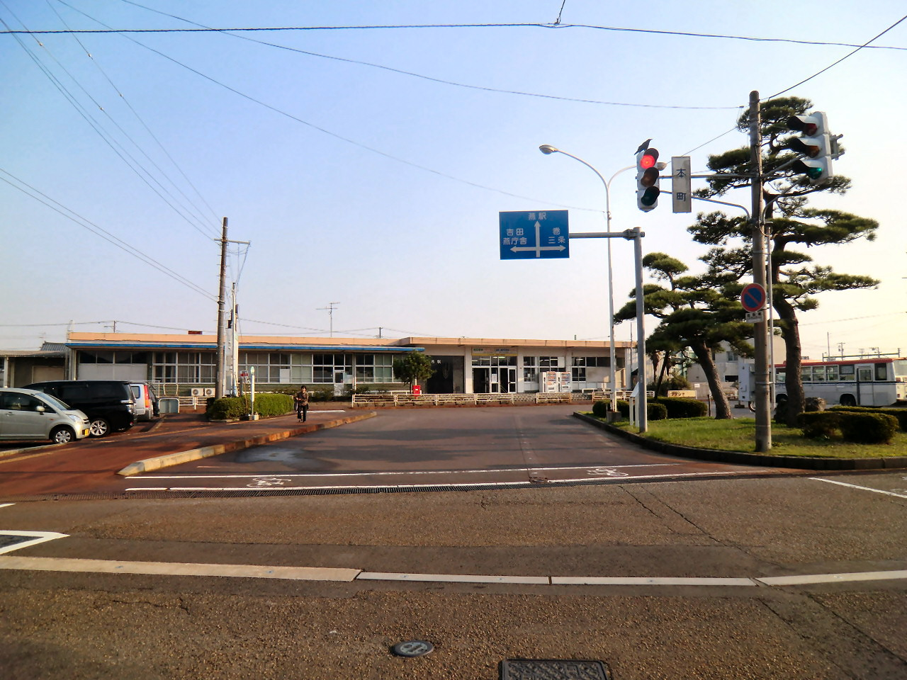 ＪＲ燕駅 正面